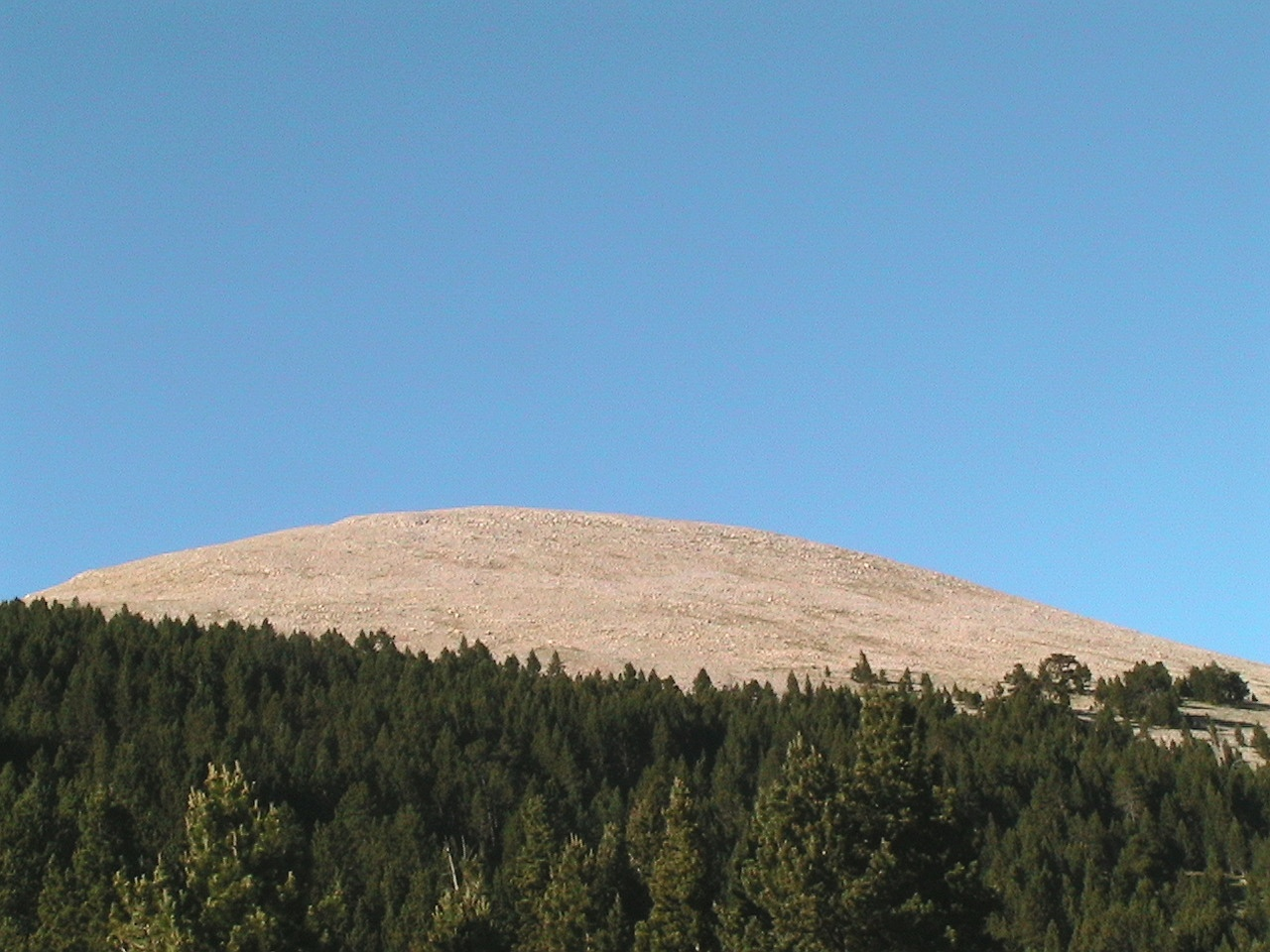 La Tossa Pelada des del Prat Llong, al Port del Comte. La Coma i la Pedra (Solsonès - Catalunya)